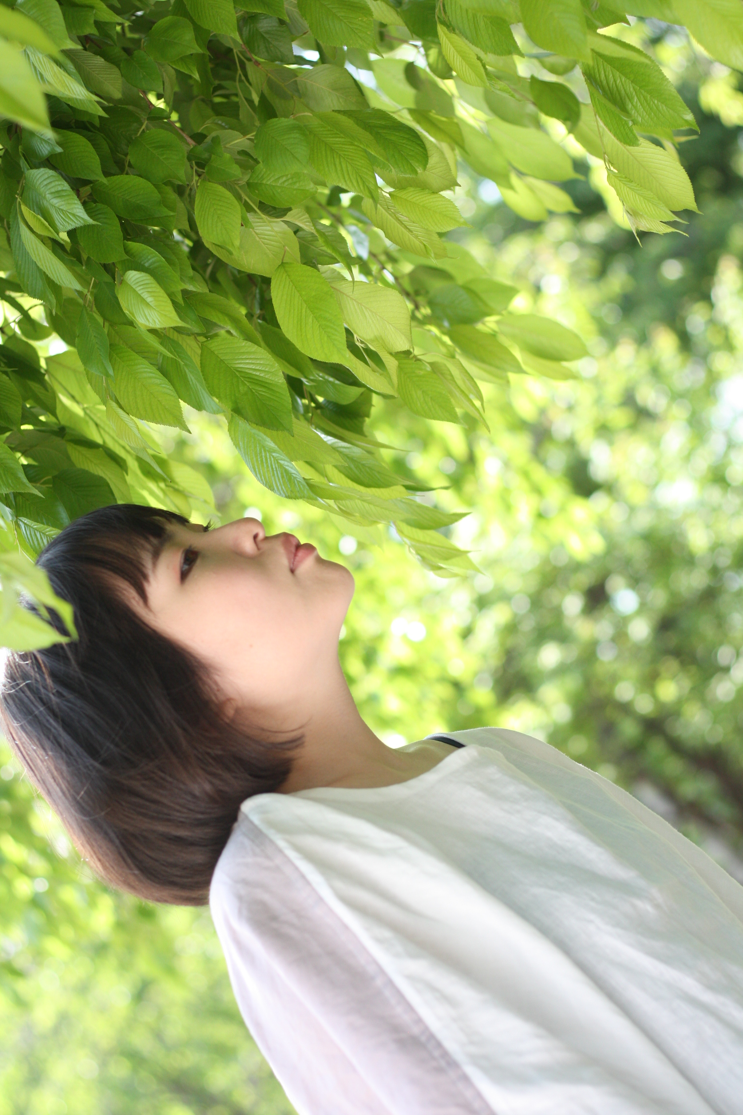 井塔由梨